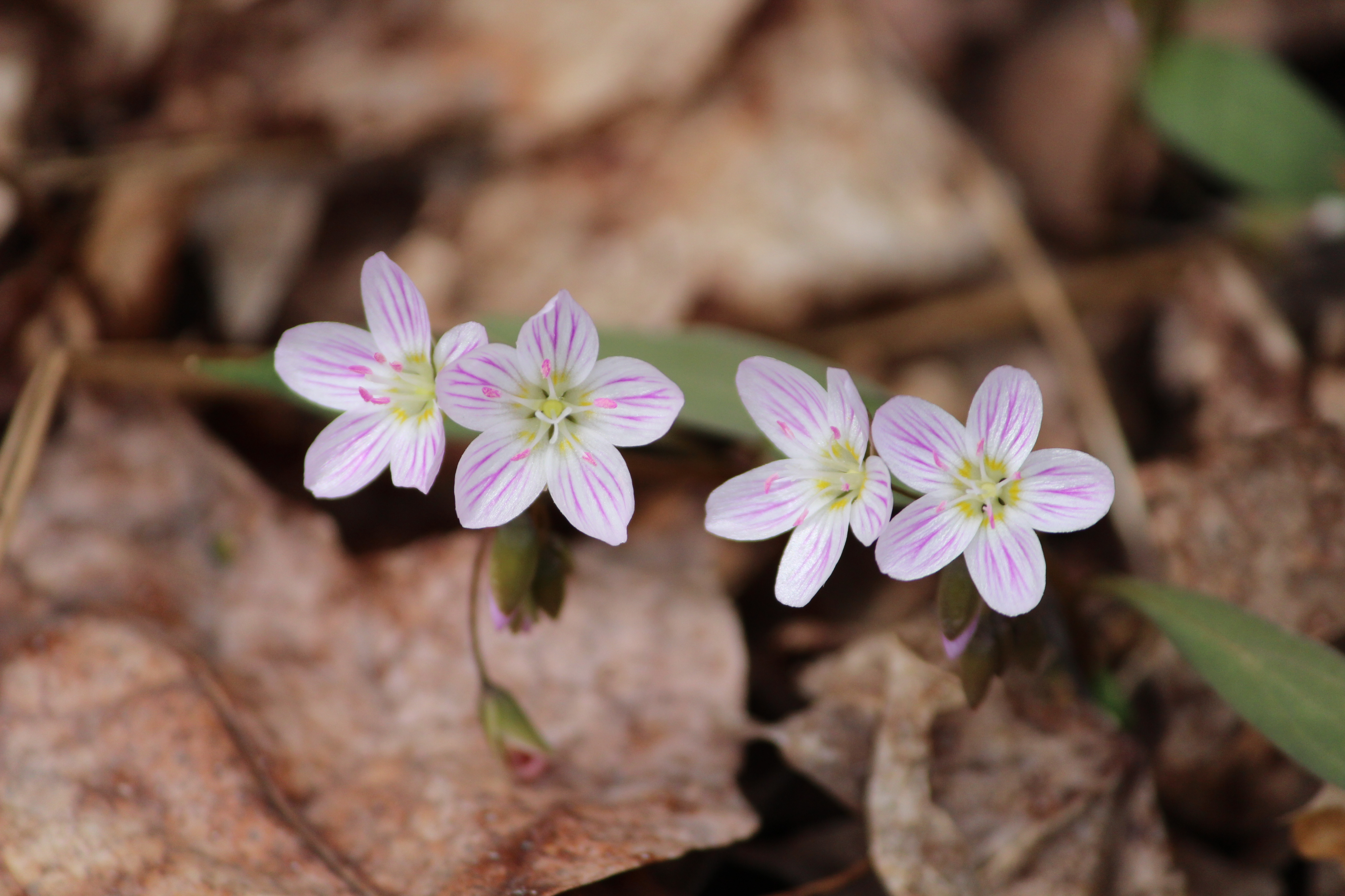 Floraison en avril dans un bois près de Bromont (domaine naturel du lac Gale). Probablement une Claytonie de Caroline.